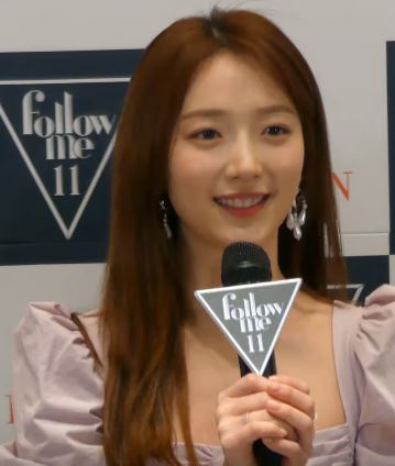 17일 오전 서울시 종로구 광화문 씨네큐브에서 여성채널 패션앤(FashionN)의 '팔로우미 시즌11' 제작발표회가 열려 승희X임보라X표예진X장희령X장희진 기자간담회 인사말 영상